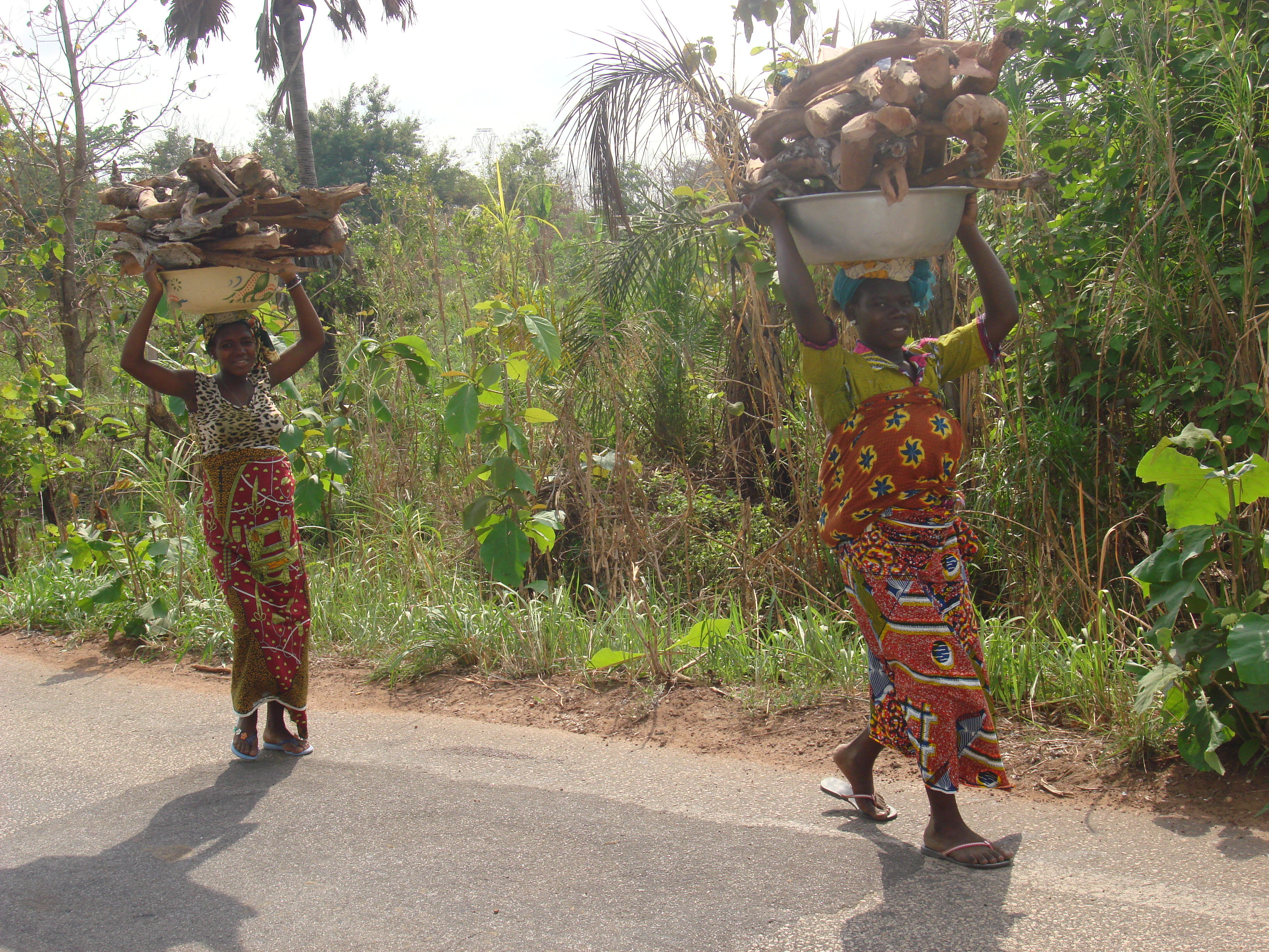 Scène de vie rurale en Côte d'Ivoire. Femmes revenant des champs.